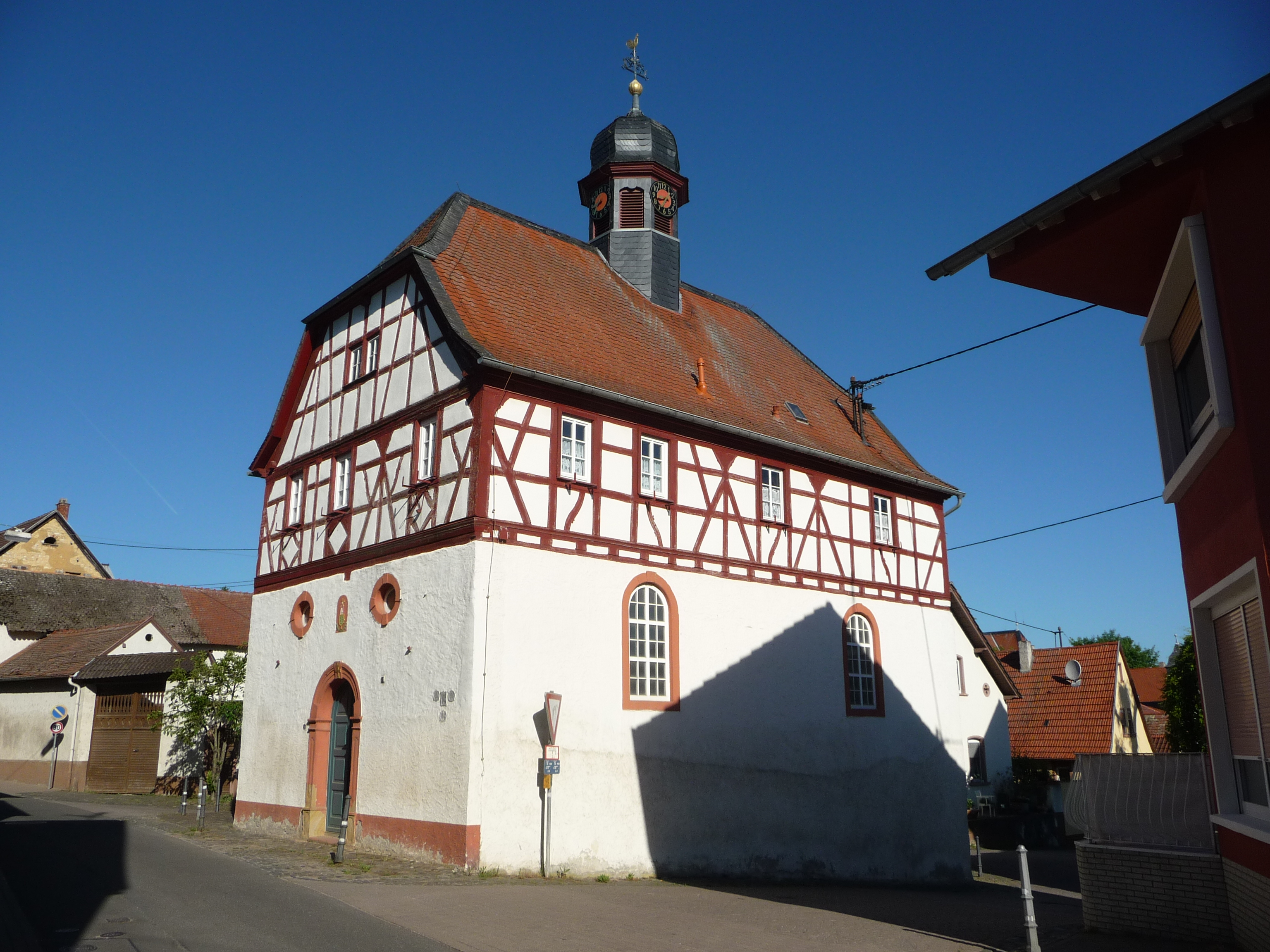 Rathaus und katholische Kirche in Flomborn, einer Ortsgemeinde im Landkreis Alzey-Worms im rheinhessischen Hügelland in Rheinland-Pfalz